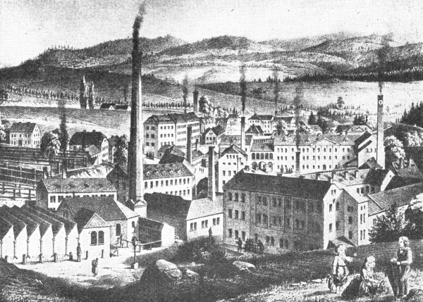 Liberecké textilní závody v polovině 19. století